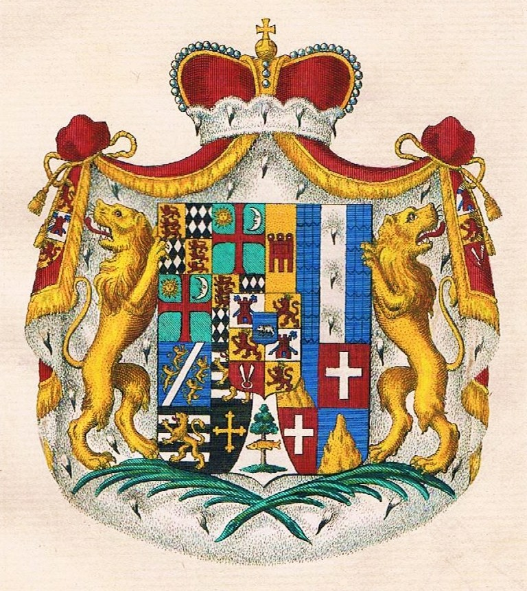 Wappen der Fürsten von Thurn und Taxis